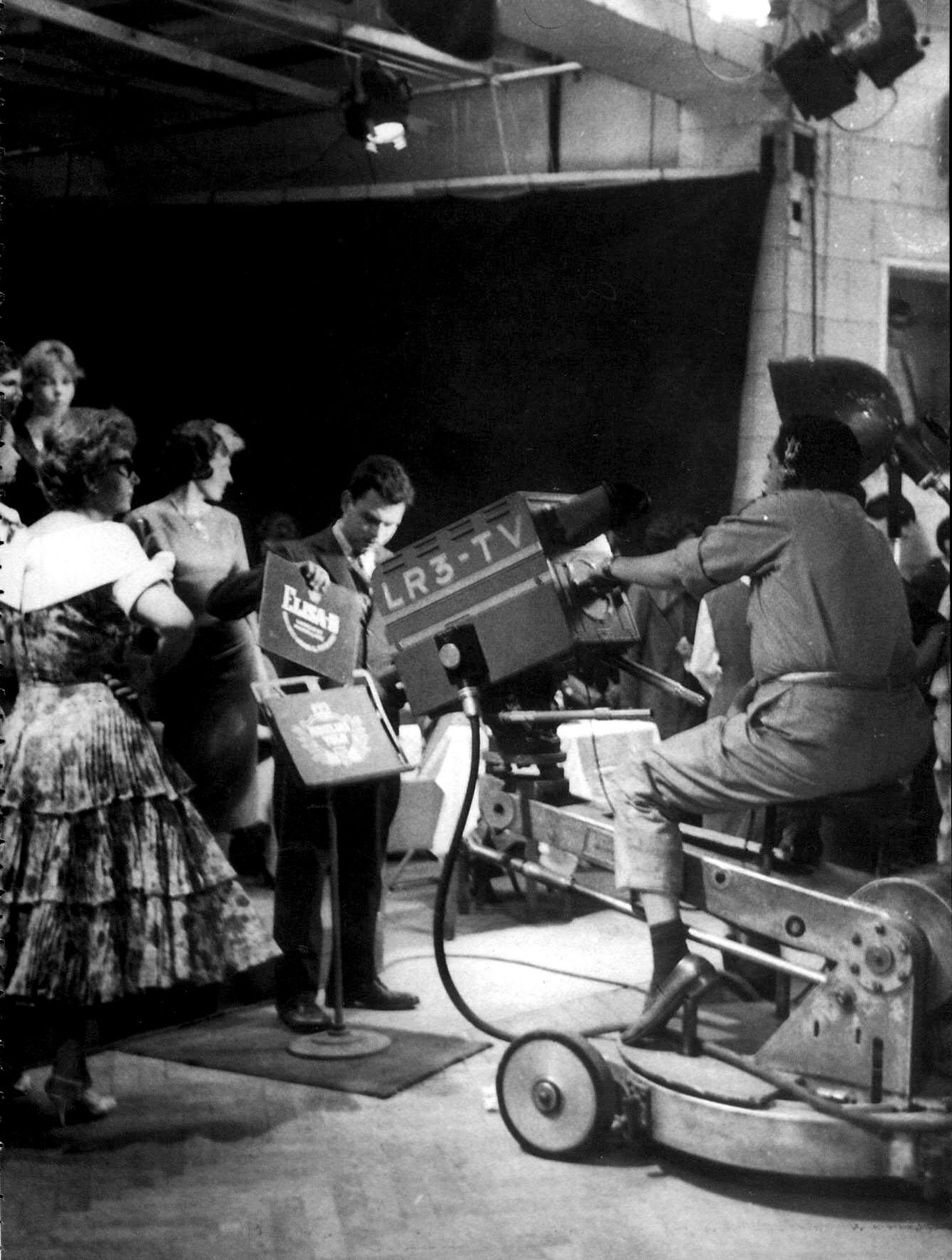 Estudio de LR3 Radio Belgrano TV, hoy Canal 7 (Televisión Pública Argentina) a mediados de los años 1950.